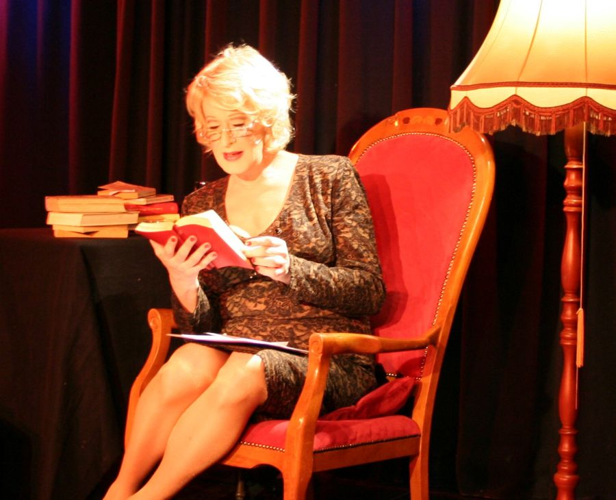 Lilo Wanders in einer Lesung aus erotischer Literatur unter dem Nietzsche-Zitat "Doch alle Lust will Ewigkeit"